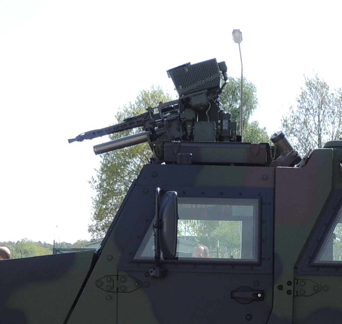 FLW 100 bestückt mir MG3 auf Mowag EAGLE IV